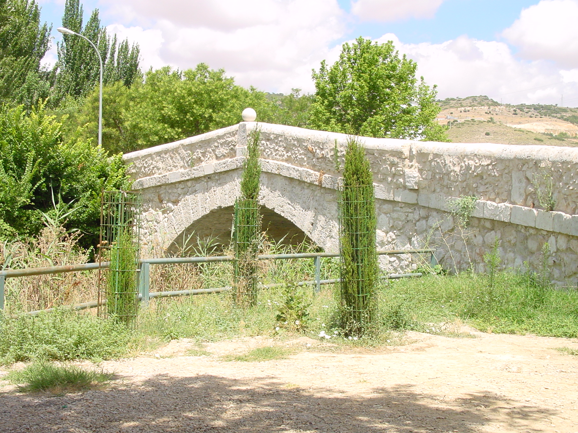 Puente medieval sobre el río Tajuña en Tielmes.